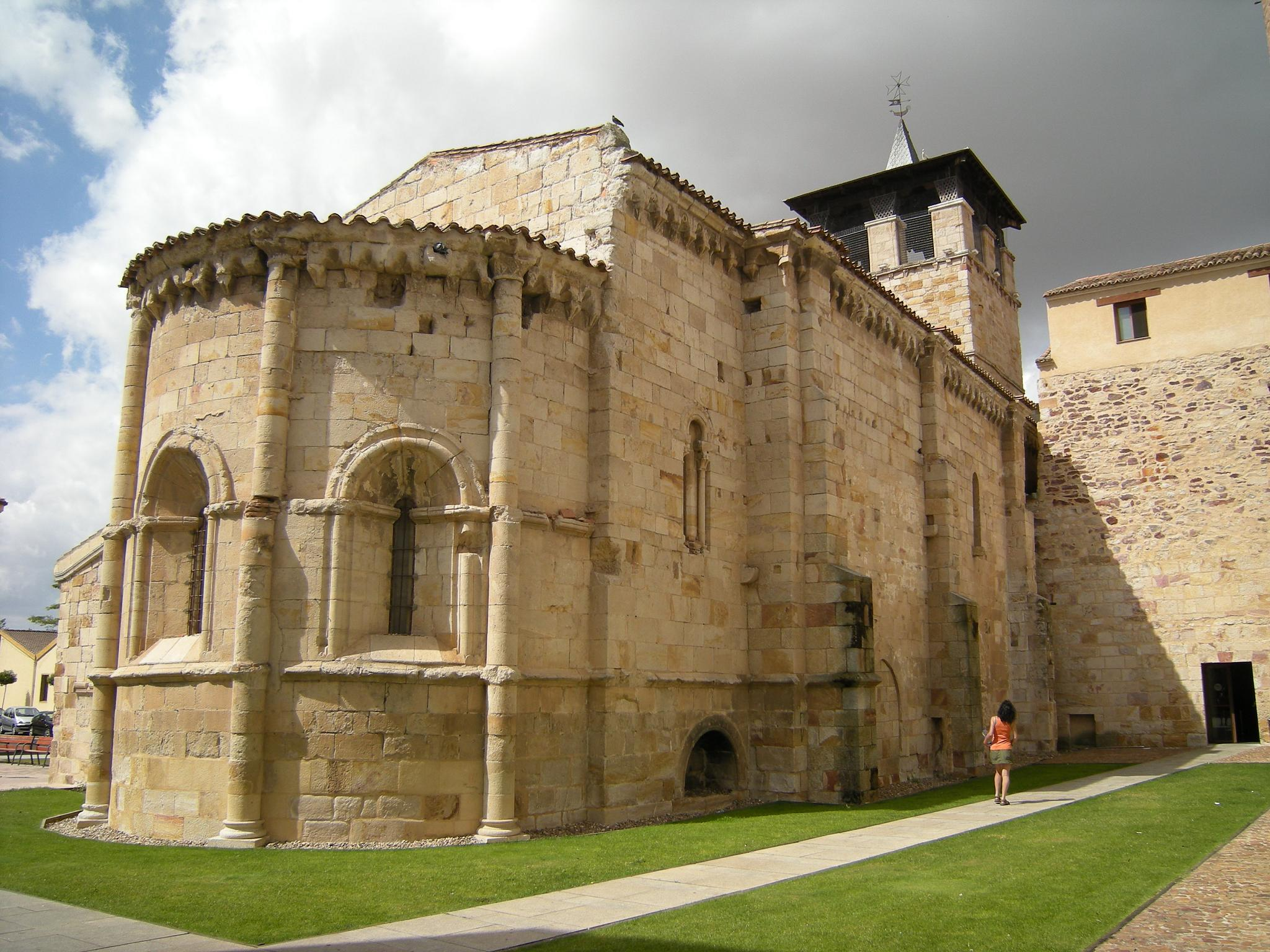 Iglesia de Santa María de la Horta. Zamora, España. Los muros laterales de la nave y del abside, se adornan debajo de la cornisa con un friso de arquillos lobulados.